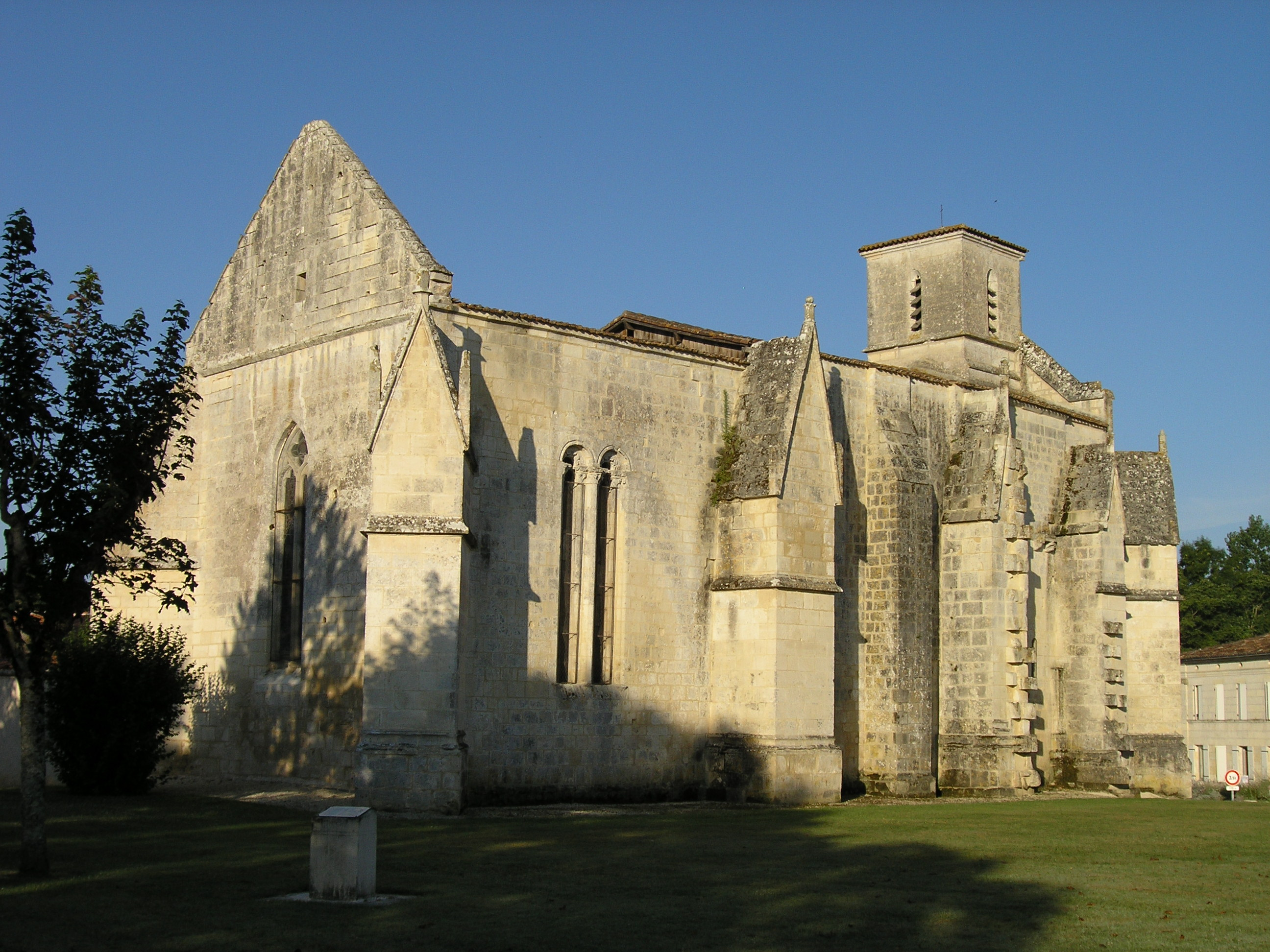 Église Saint-Madeleine de Varzay